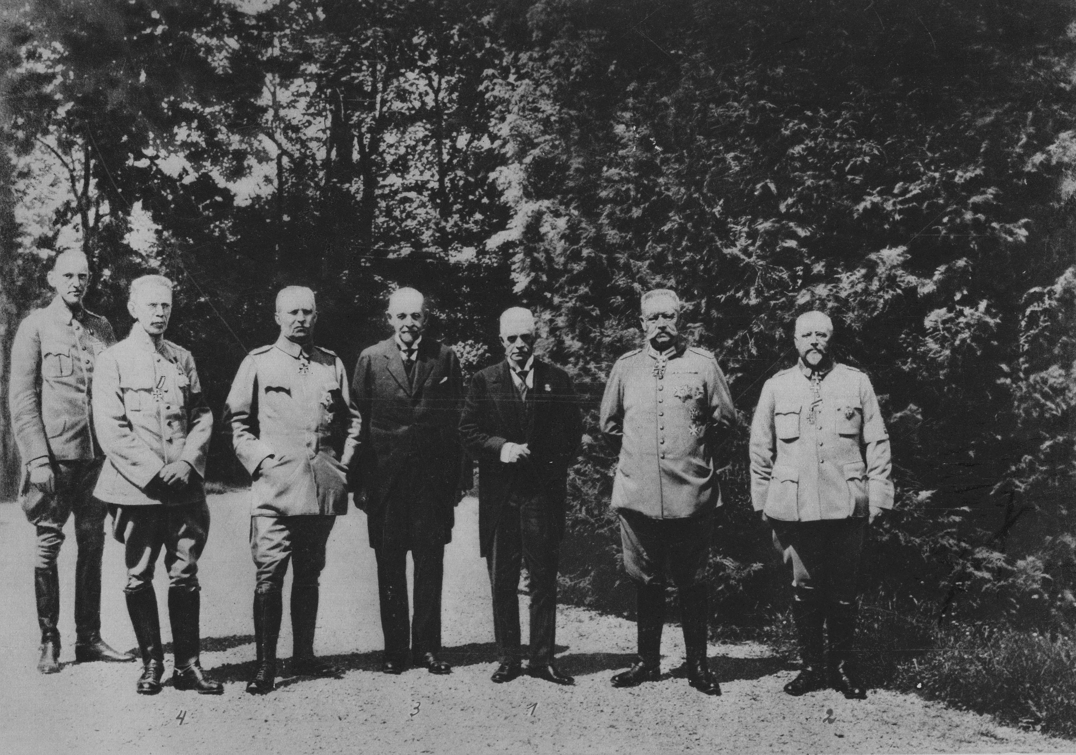 Suomen itsenäisyyden tunnustamista hakevaa valtuuskuntaa johti valtioneuvos Edvard Hjelt (kolmas oikealta). Valtuuskunta kävi heinäkuussa 1918 Saksassa ja Itävallassa. Saksan sodanjohdon päämajassa kenraali Hannes Ignatius (uloimpana oikealla) valtionhoitaja P.E.Svinhufvudin nimissä luovutti Suomen vapaudenristin suurristin sotamarsalkka Paul von Hindenburgille (toinen oikealta) ja kenraali Erich Ludendorffille (kolmas vasemmalta).